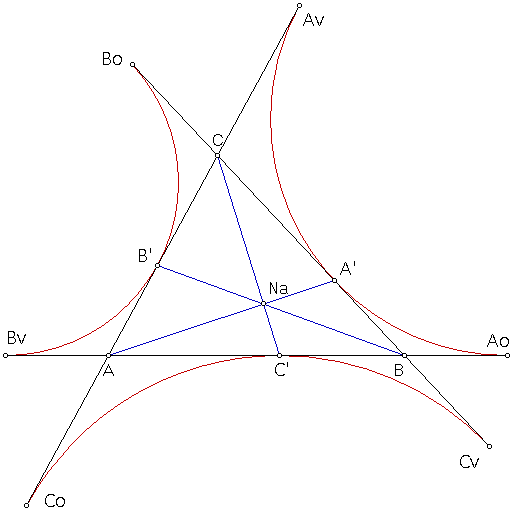 Het punt van Nagel